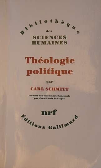 Couverture de: Theologie politique, de Carl Schmitt